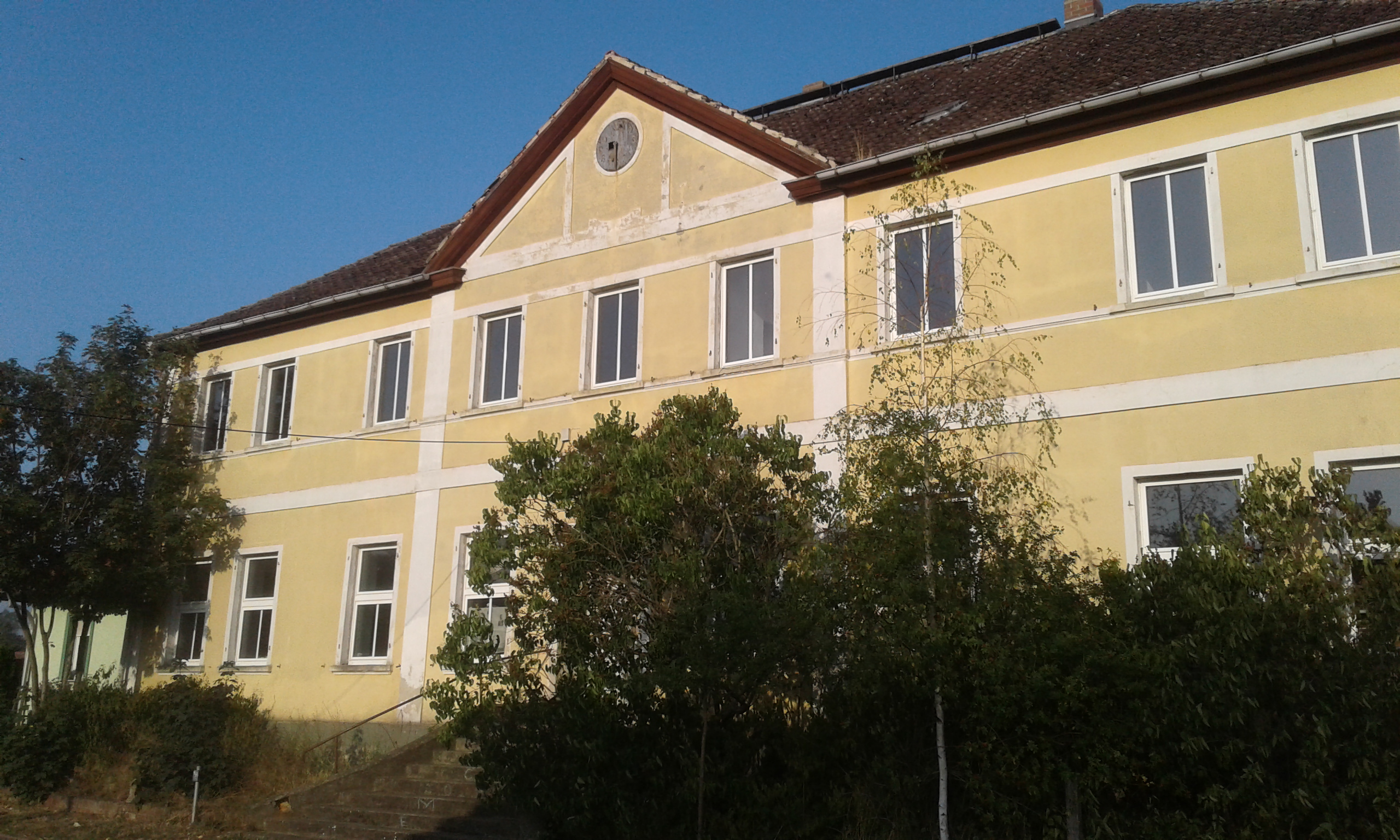 Gutshaus